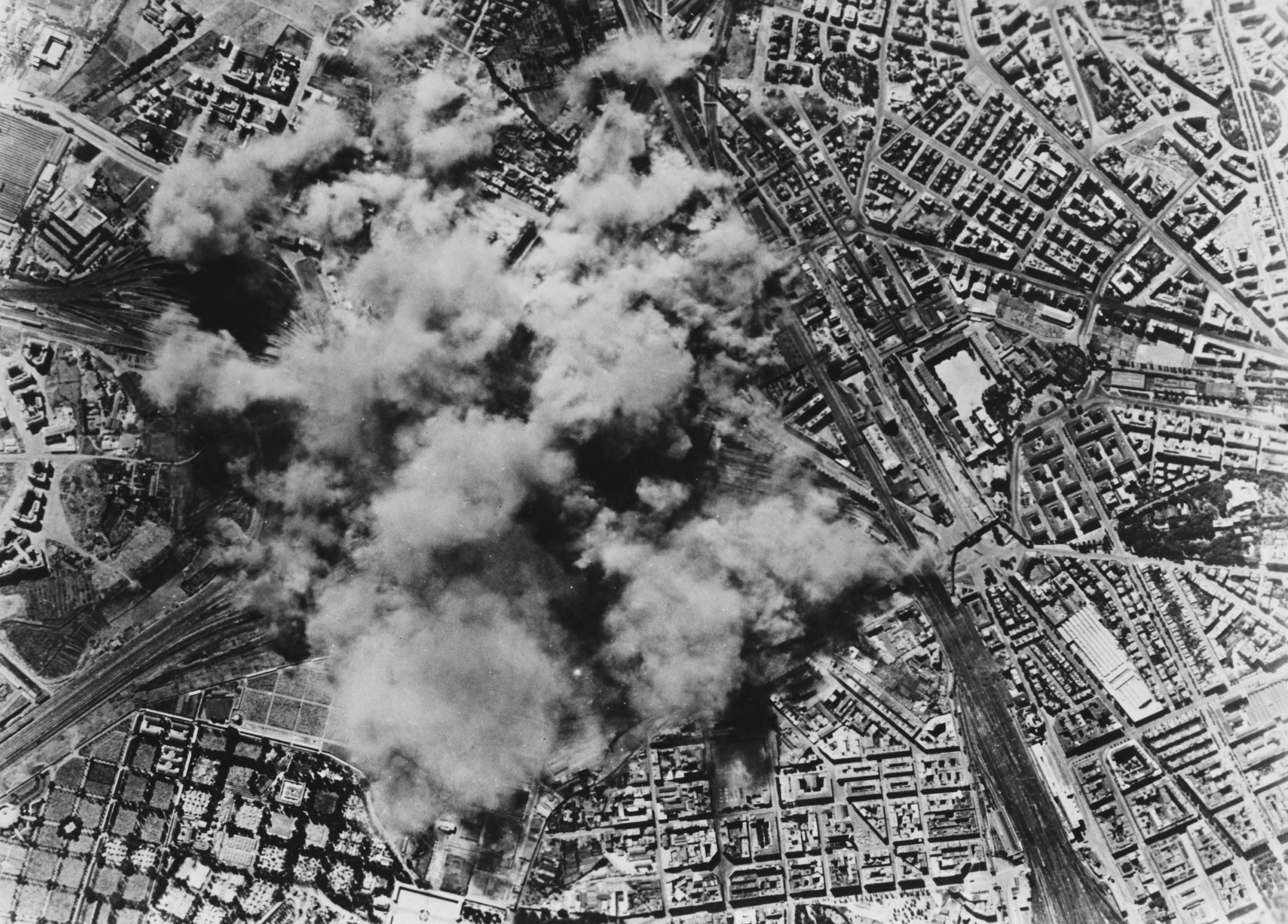 Il primo bombardamento di Roma avvenne il 19 luglio del 1943, durante la seconda guerra mondiale, ad opera di bombardieri statunitensi